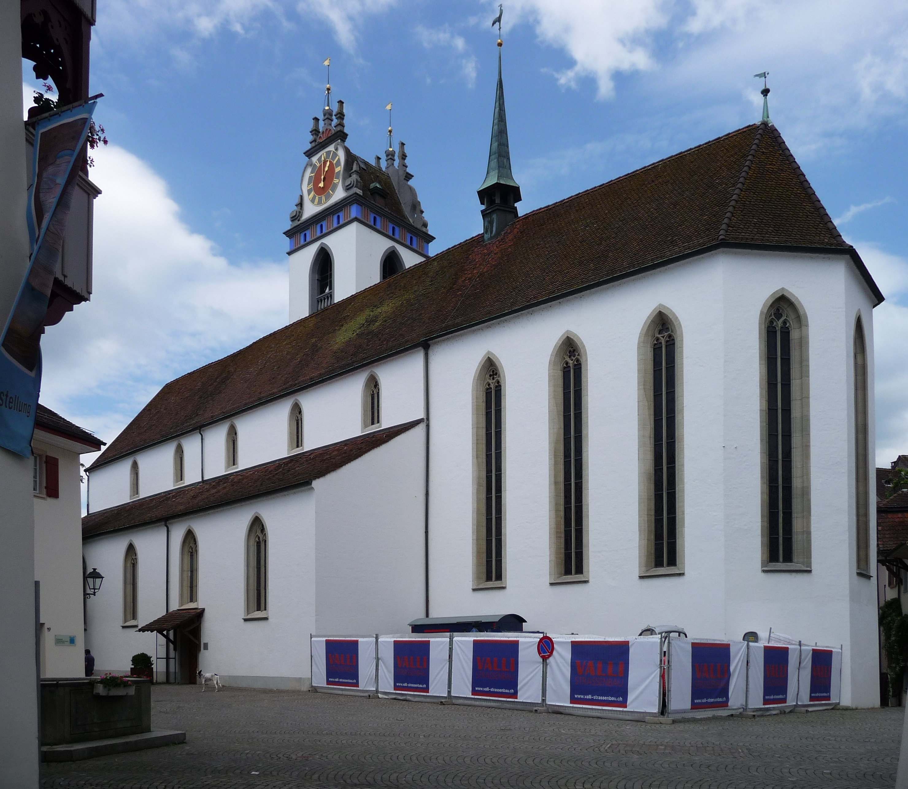 Stadtkirche Aarau